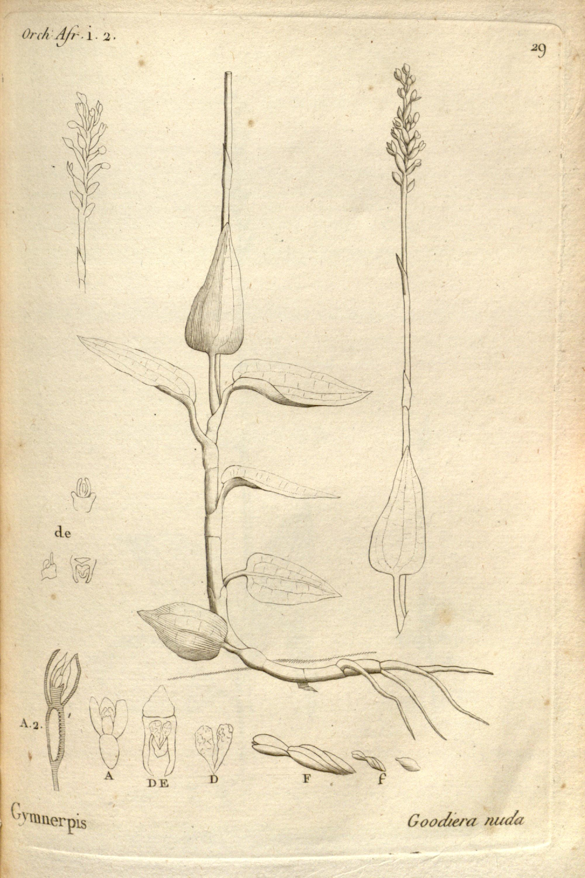 Histoire particulière des plantes Orchidées recueillies sur les trois îles australes d'Afrique, de France, de Bourbon et de Madagascar /par Aubert-Aubert Du Petit-Thouars ...